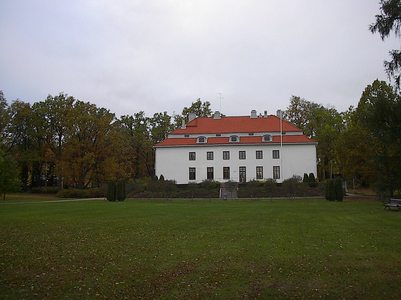 Träskändan kartano